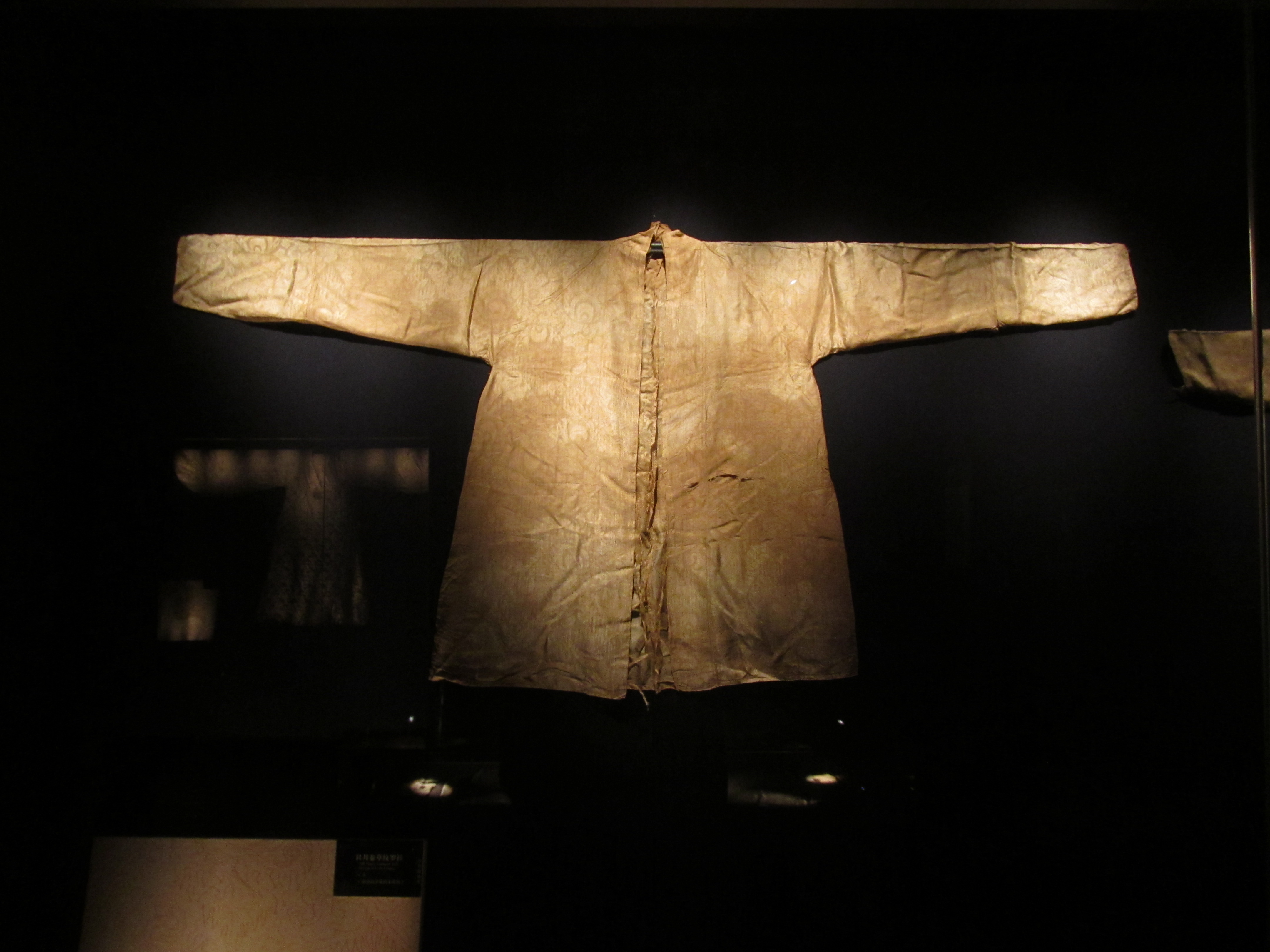 南京高淳花由宋墓出土的宋代日月卷草纹罗衫。